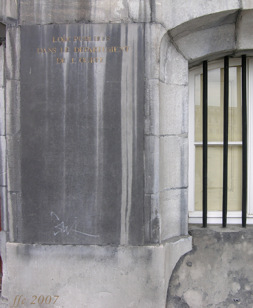 "Loix publiées dans le département de l'Ourte" - mention datant de la présence française (1795-1815) Taula d'afixació de les lleis del departament de l'Ourte